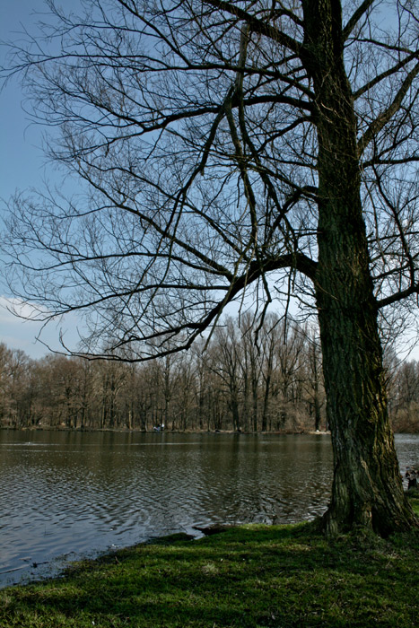 In Max Ashmann park